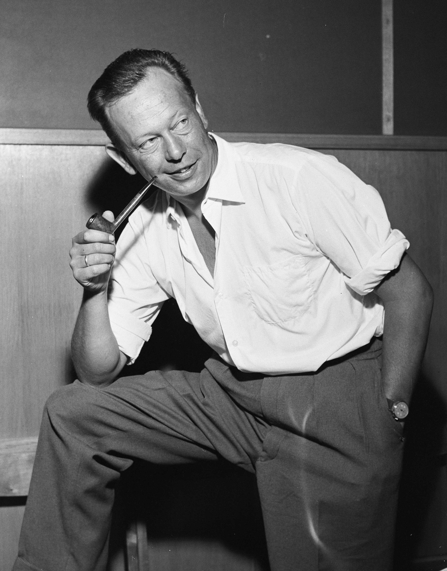 Frimann Falck Clausen var en norsk skuespiller.